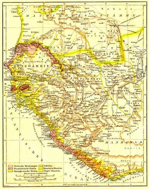 Senegambia, Andrees Allgemeiner Handatlas, 1st Edition, Leipzig (Germany) 1881, Page 96, Map 1.